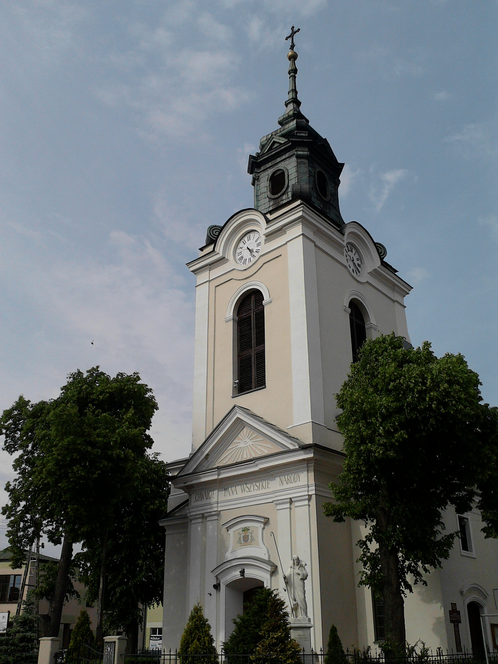 Kolegiata w Wolborzu